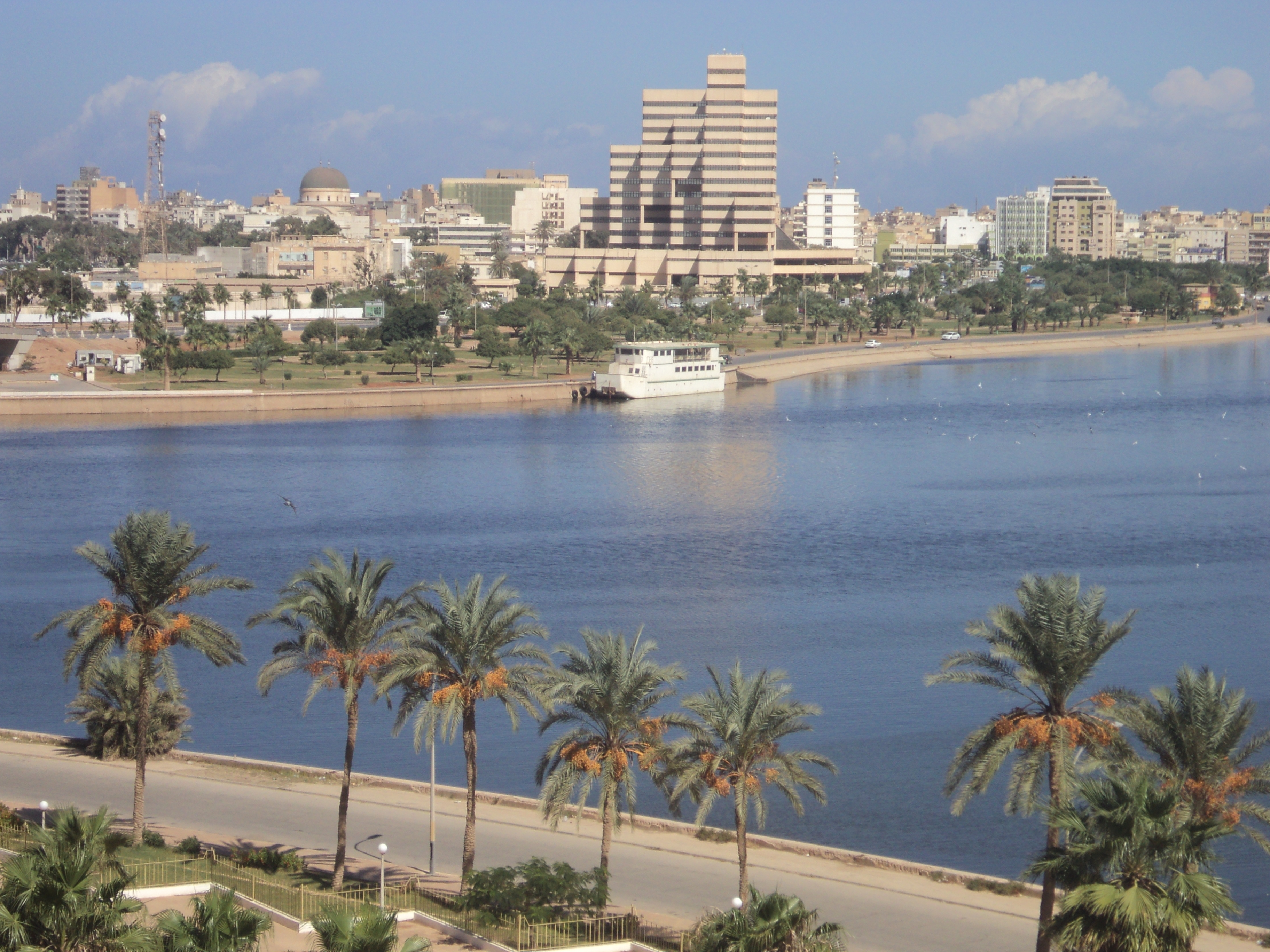 Al Daawa al Islamiyah building in Benghazi, Libya.